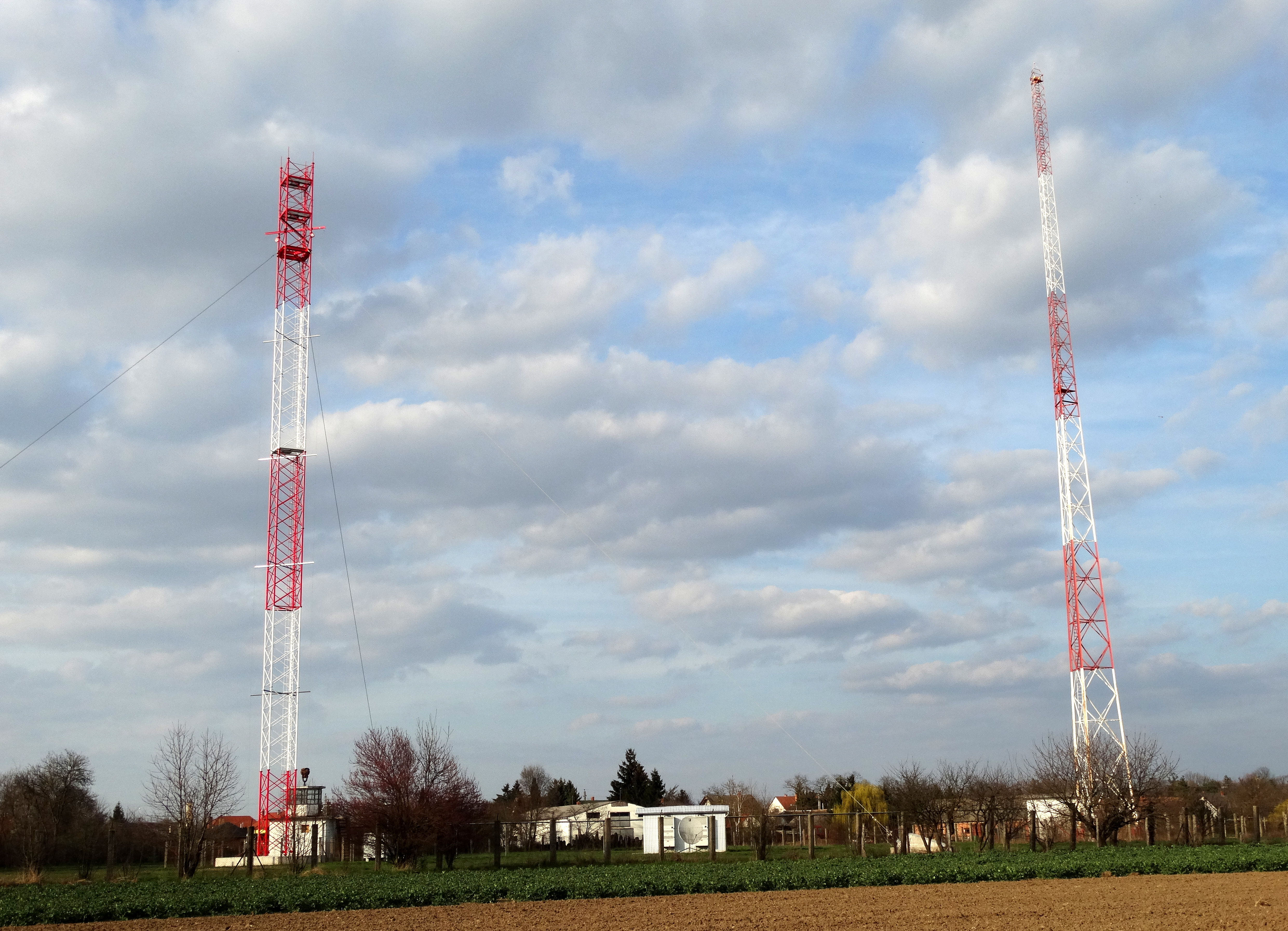 Mittelwellensender Szombathely in Ungarn mit zwei selbststrahlenden Sendemasten. Links ein geerdeter Sendemast mit Mittelpunktspeisung. Der rechte Sendemast ist gegen Erde isoliert.